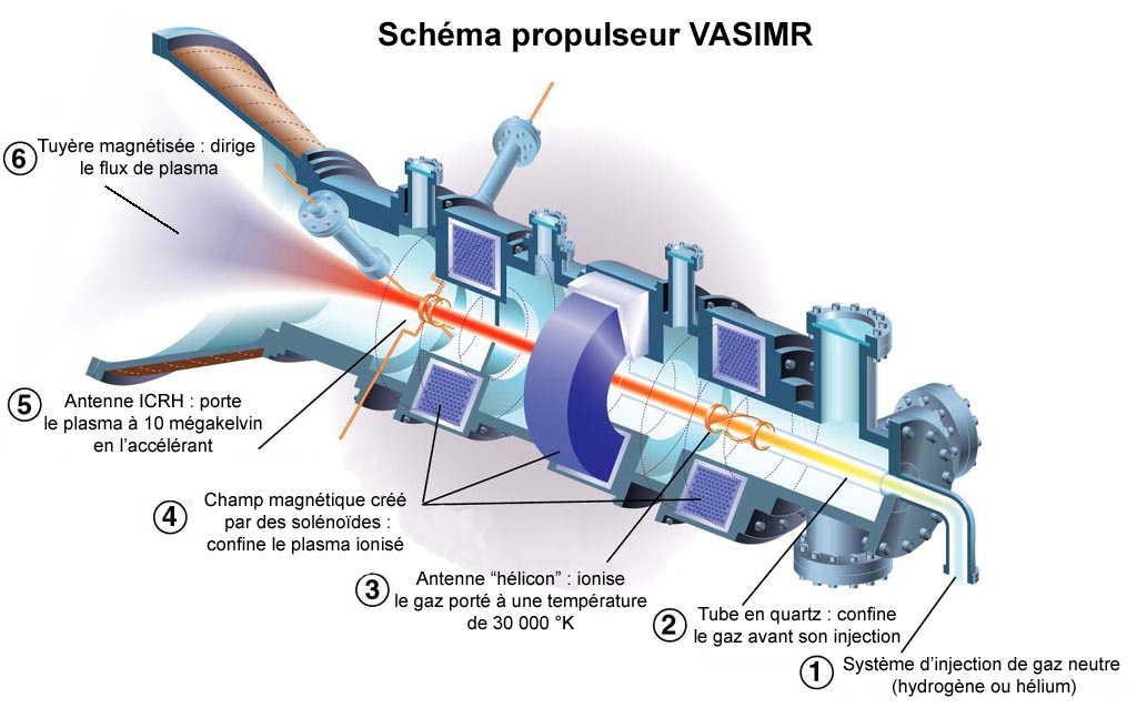 Schéma du propulseur VASIMR (Variable specific impulse magnetoplasma rocket)